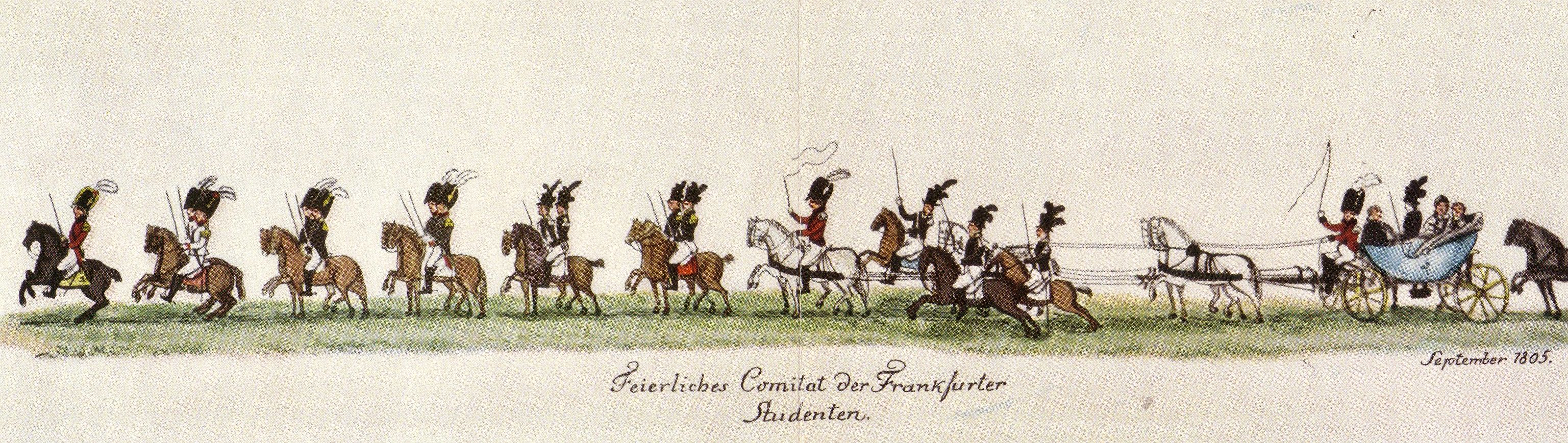 Feierliches Comitat der Studenten an der Viadrina zu Frankfurt (Oder)